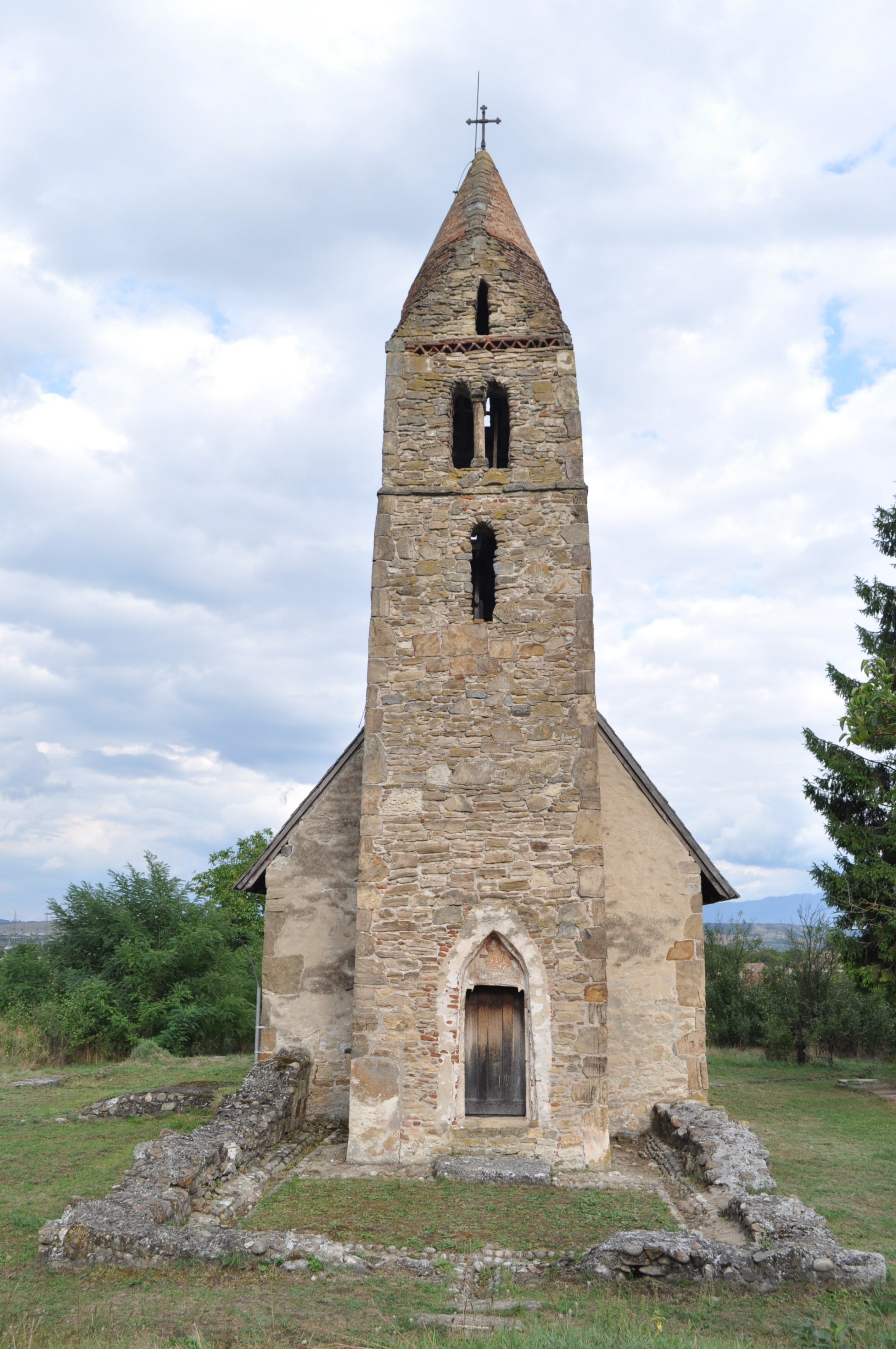 Biserica „Adormirea Maicii Domnului”, sat aparținător Strei; oraș Călan